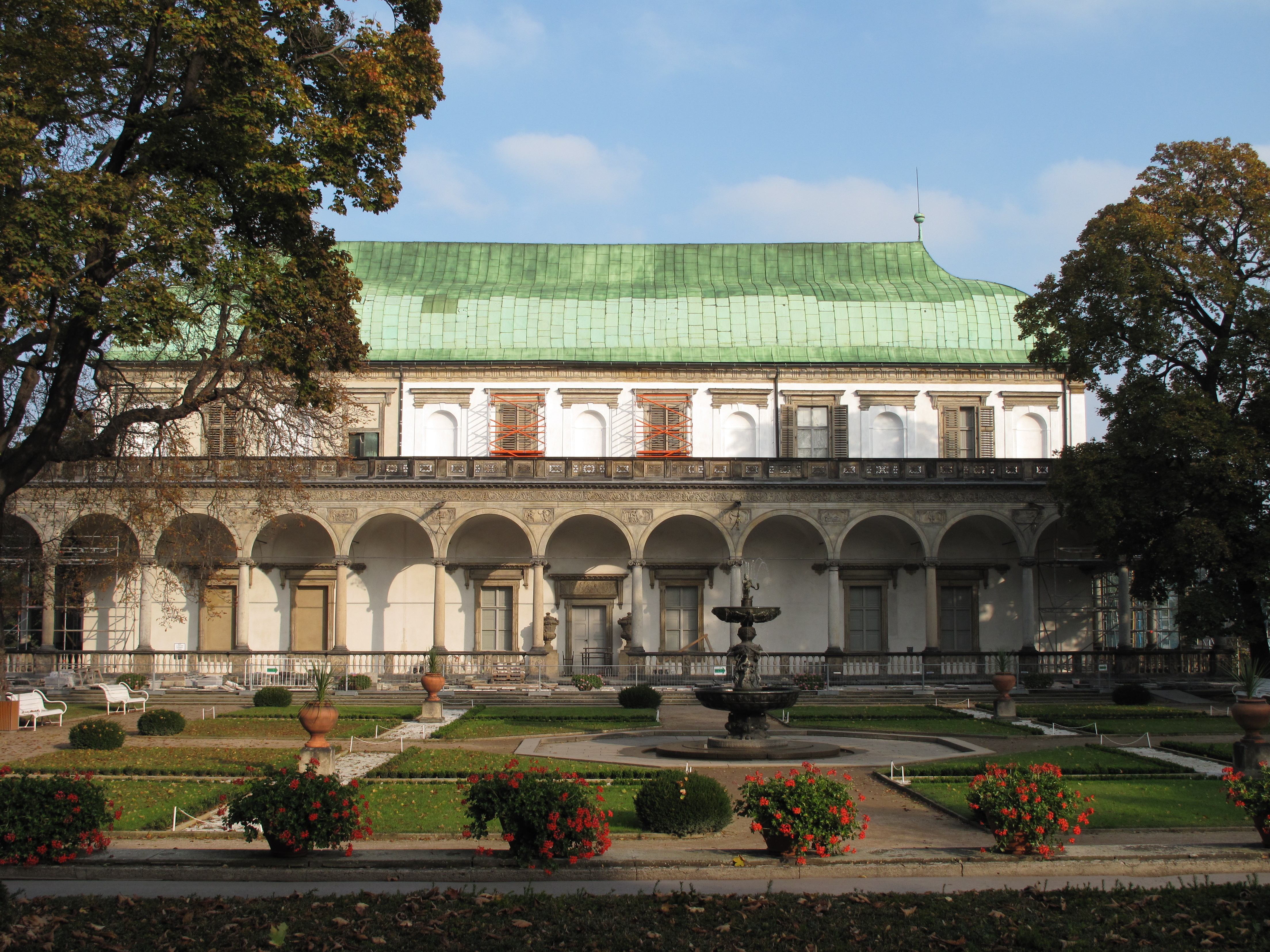 Hradčany, Praha, Česká republika.